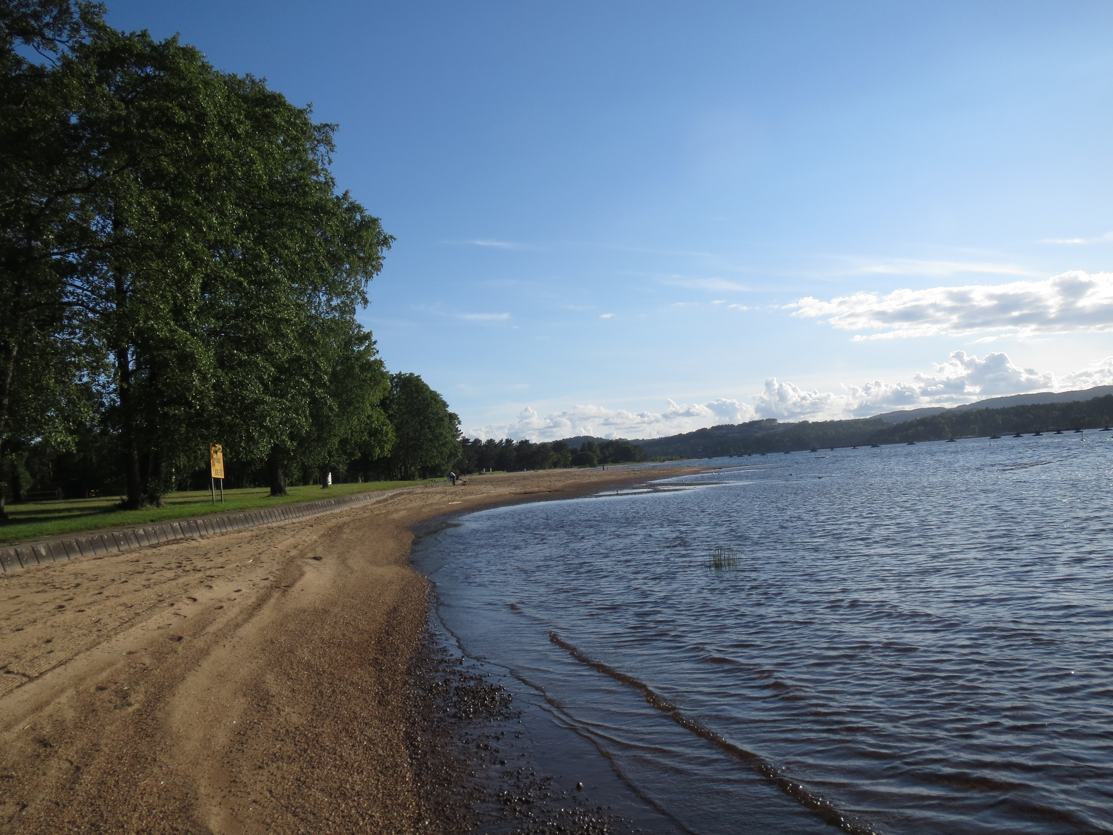 Hamresanden ved Tovdalselva i Kristiansand